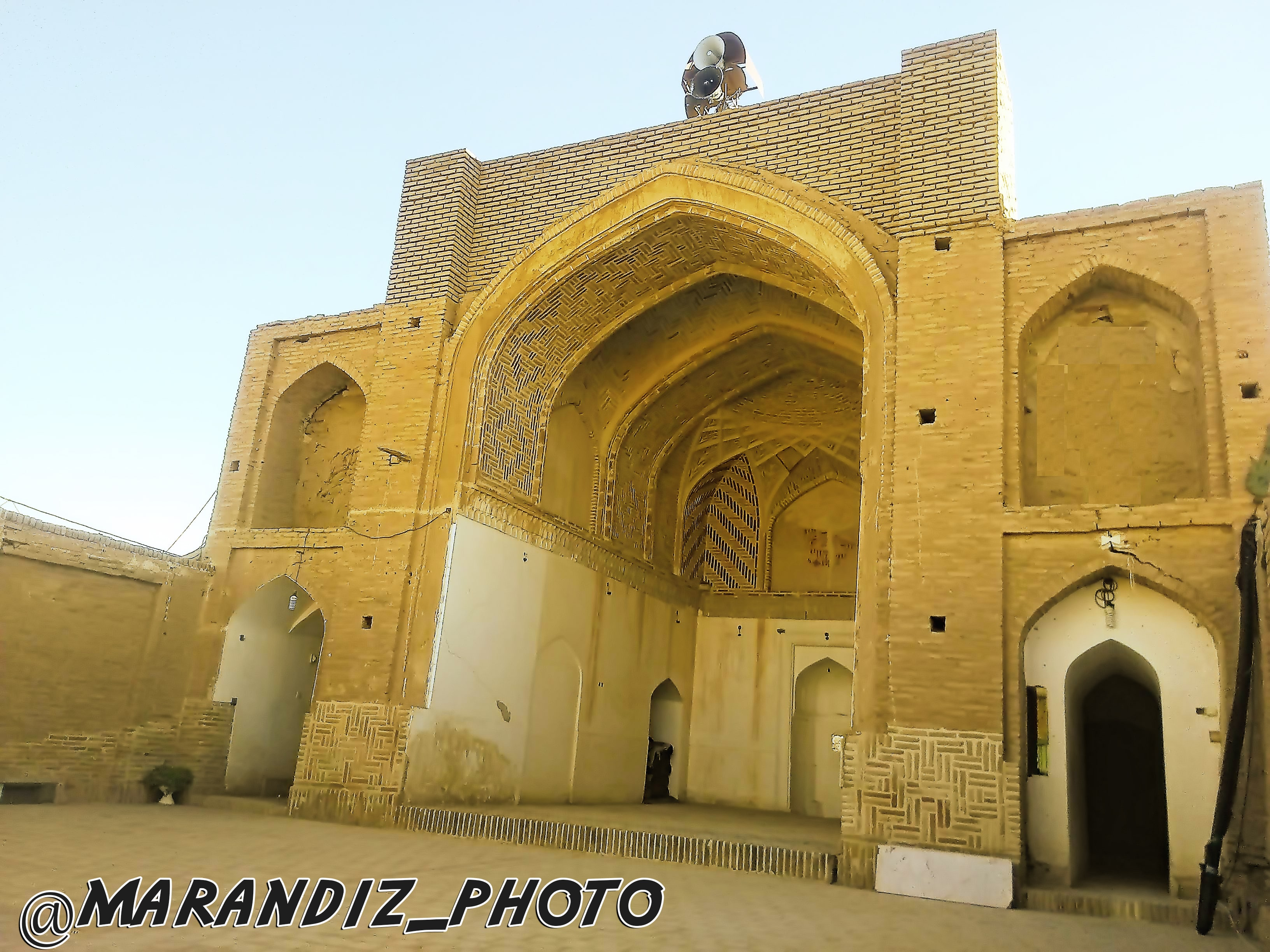 مسجد جامع مرندیز